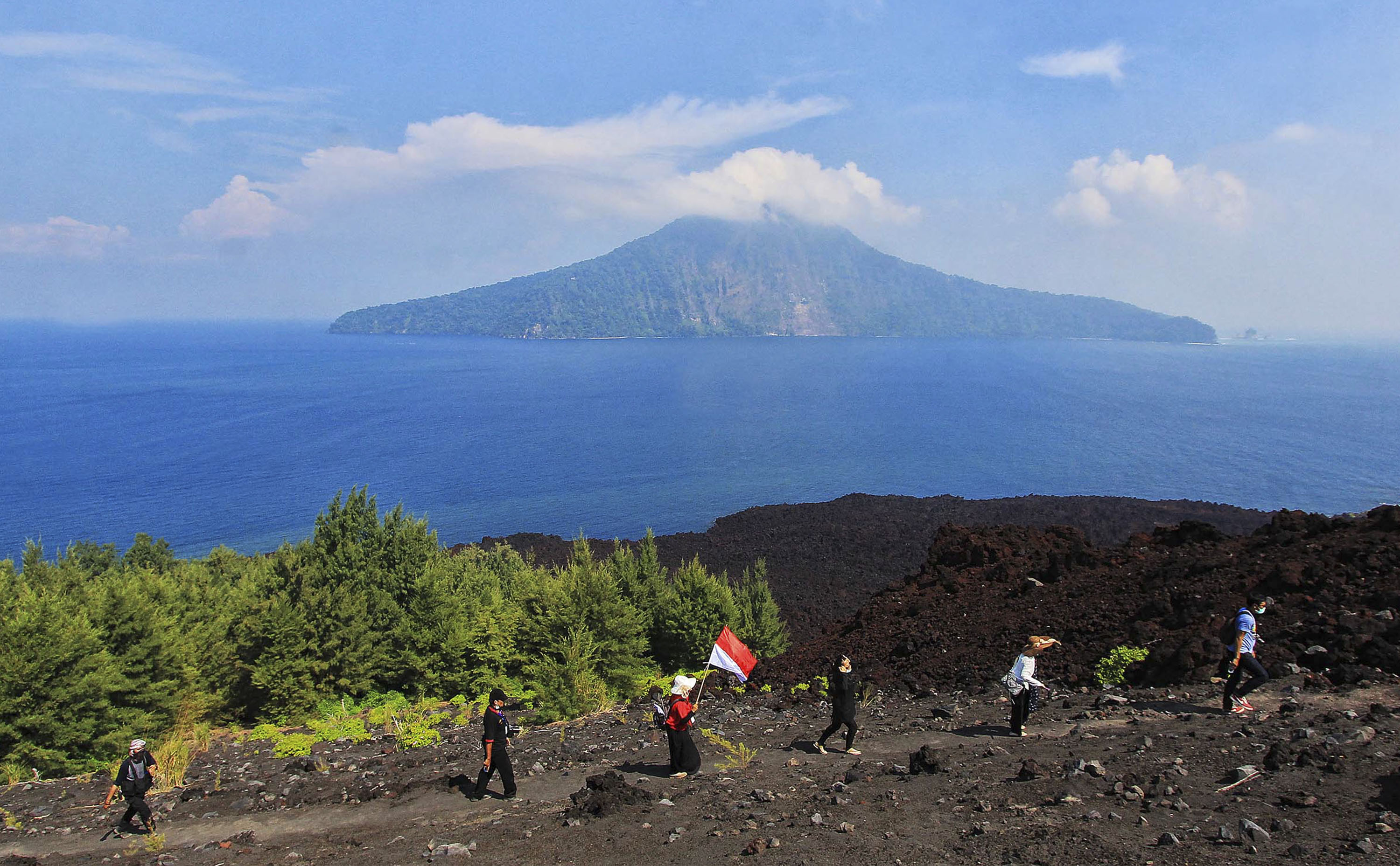 Gunning Krakatau Puluhan wisatawan dalam dan luar negeri napak tilas mendaki memperingati 133 tahun meletusnya Gunung Krakatau dalam rangka Festival Krakatau 2016 di Anak Gunung Krakatau di Lampung, Sabtu (27/8/16). Anak Gunung Krakatau adalah cagar alam mempunyai daya tarik bagi ilmuwan karena kawasan ini dapat berfungsi sebagai laboratorium alami untuk mempelajari pengetahuan alam,geografi,vulkanologi, dan biologi. Foto : Dwi Pambudo